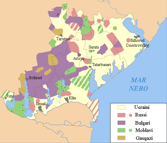 Distribuzione etnolinguistica della regione del Budjak.